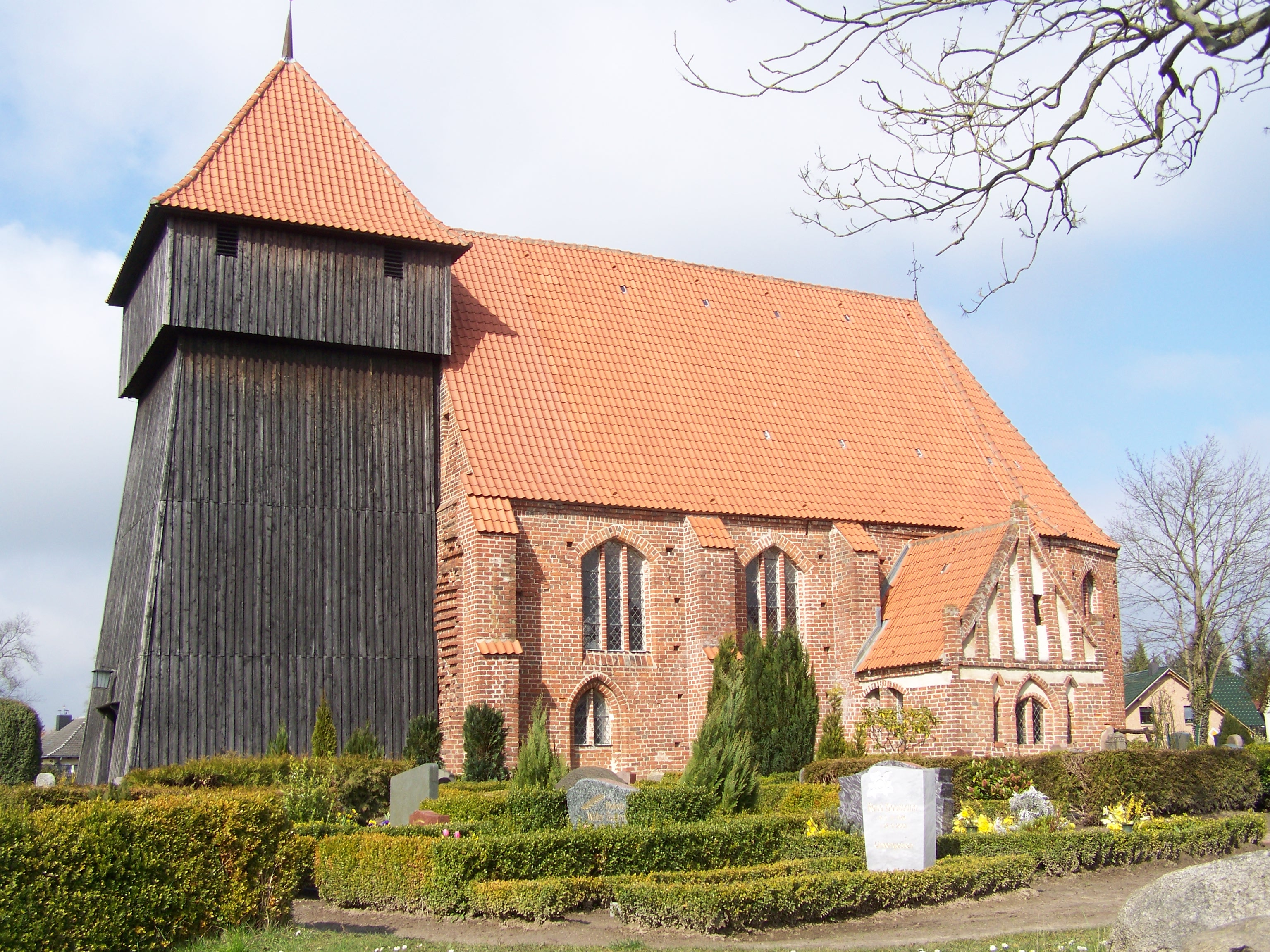 Dorfkirche_Abtshagen